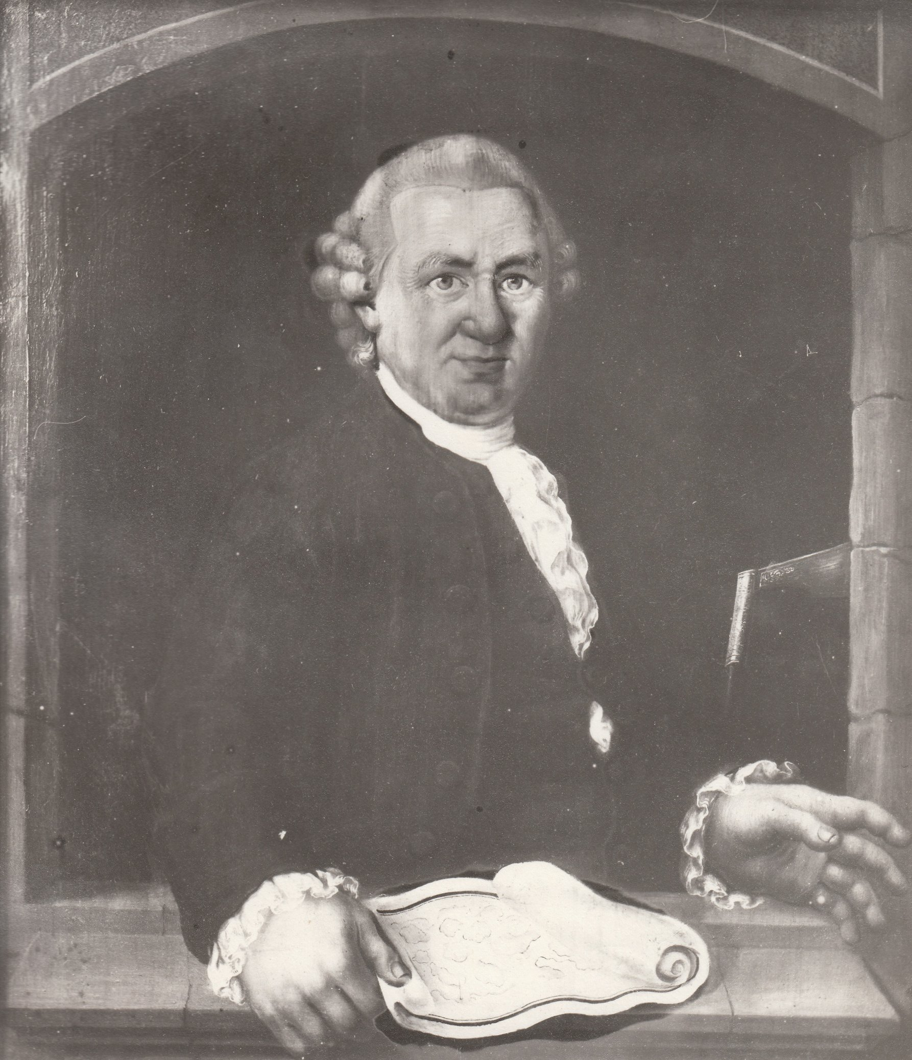 Fotograf: Erik Olsen (1835 - 1920). Format: Fotopositiv. År: 1897. Fra utstillingen i anledning Trondhjems 900-årsjubileum i 1897. Utstillingstekst i Trondhjems 900 Aars Jubilæum: Katalog for Den Historiske Udstilling i Trondhjem 1897: 1104. Hiort, Peder, f. paa Røros 1716, d. 1789. Direktør ved Røros Kobberverk 1772-89. Ugift. Var Værkets Proviantskriver 1742-62, og dets Bergskriver 1762-72, og som saadan endog valgt til Medlem af Værkets Overdirektion 1768-71. I de 45 Aar, Hiort var ansat ved Værket, gjorde han sig i sine forskjellige Stillinger altid bemærket som en af de dygtigste Funktionærer, Værket nogensinde har havt. Han forfattede ogsaa dets Historie, der udkom i Kra. 1846. Han og hans nærmeste Familie ligger begravet i et af ham opført Gravkapel ved Røros Kirke. Størstedelen af sin Formue skjænkede han til en efter ham opkaldt Stiftelse, hvis Hensigt er at fremhjælpe Arbeidsomhed. OM., Brystbill. i 1/2 Størr. * Hiortske Gravkapel, Røros.